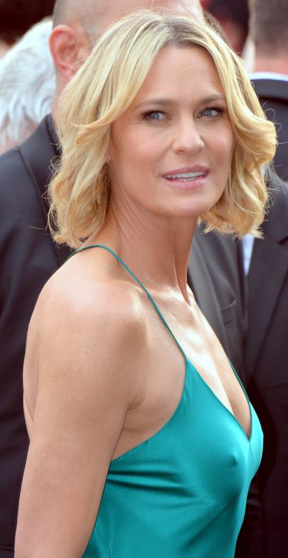 Robin Wright au festival de Cannes